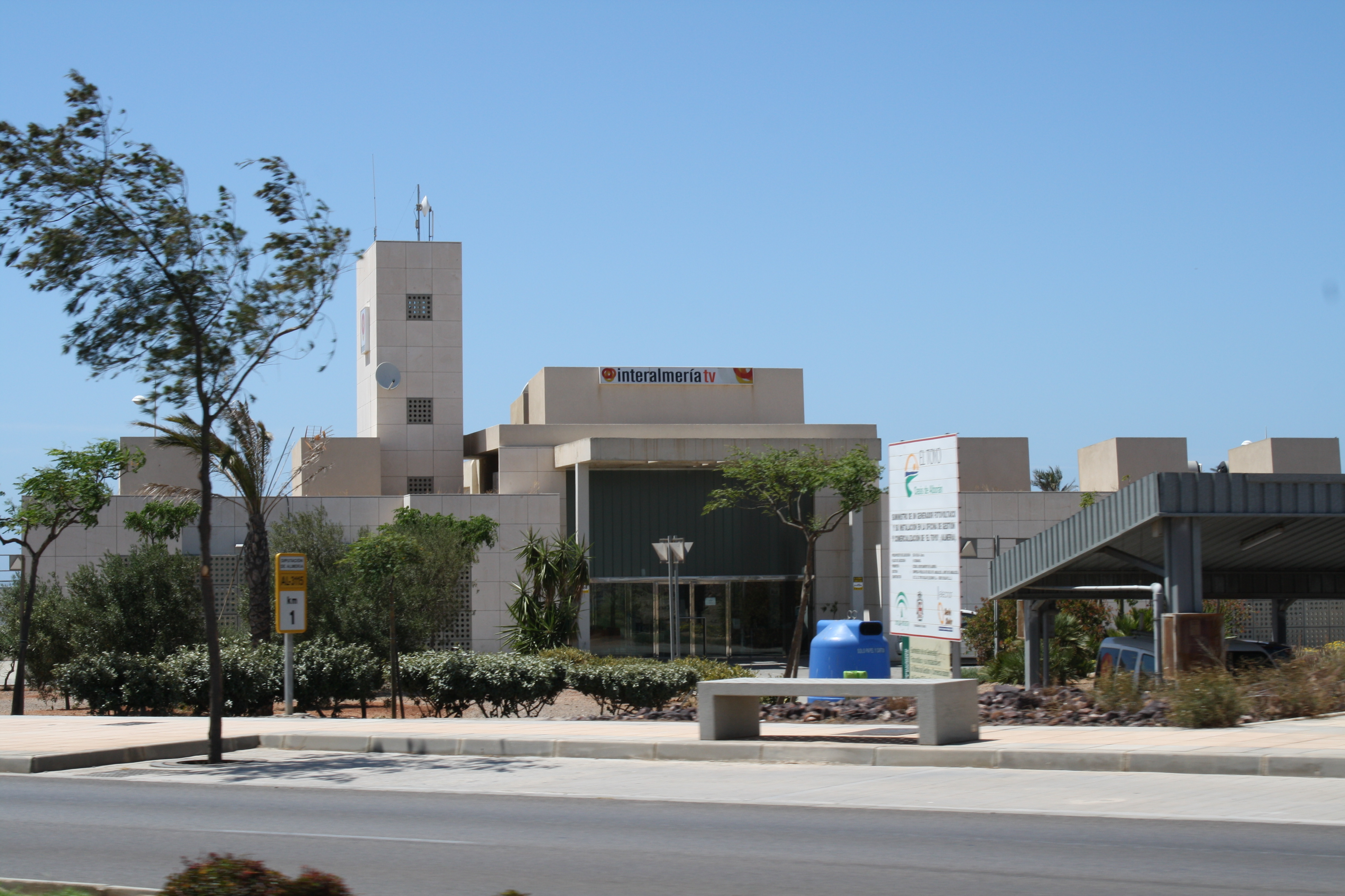 Interalmería TV